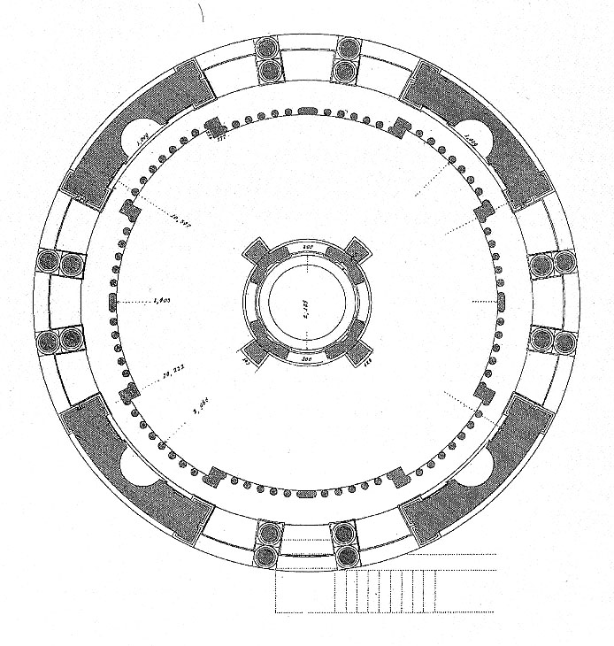 Pianta della cappella Pellegrini a Verona, opera di Michele Sanmicheli, disegnata da Francesco Ronzani